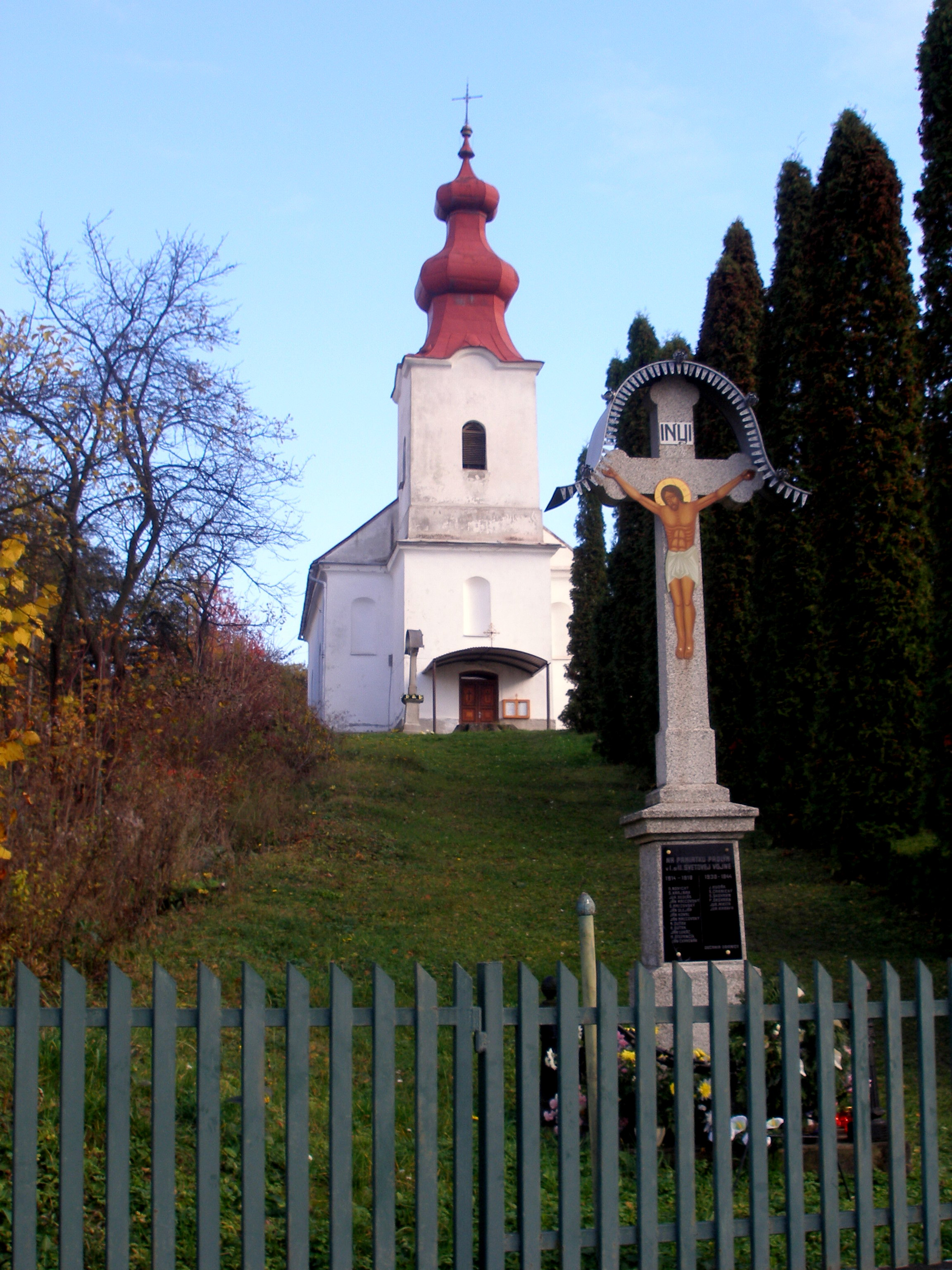 Podhorská obec Drienica, okres Sabinov, región Šariš